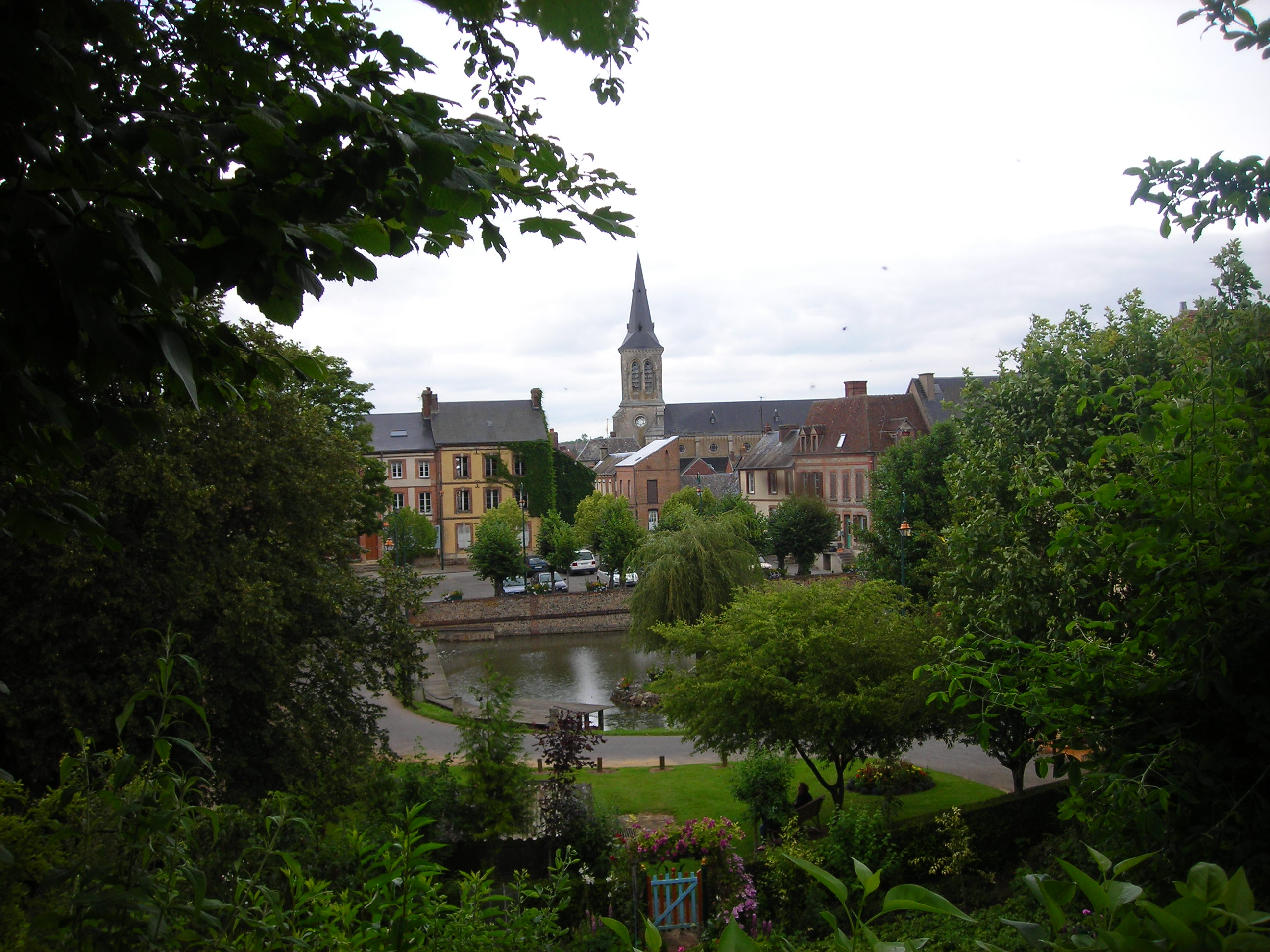 Vue du centre de Moulins-la-Marche depuis la Motte féodale (Orne, France).